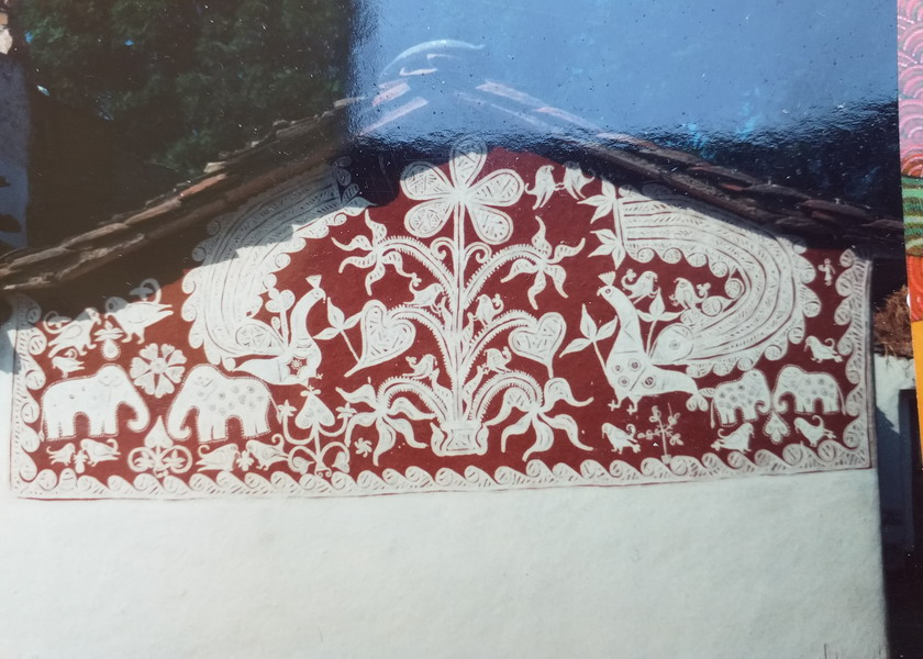 Meena tribe painting